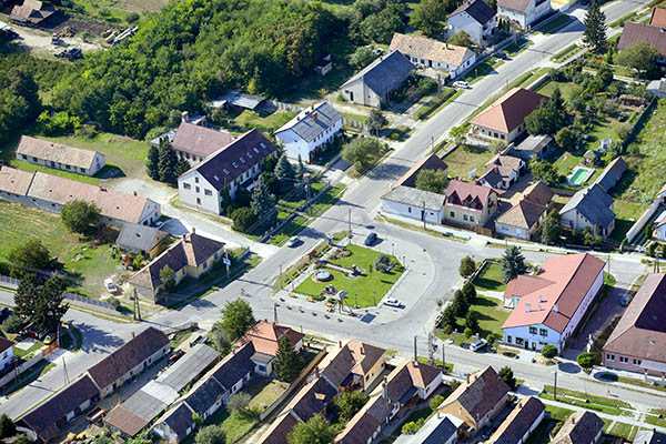 Nemesszalók